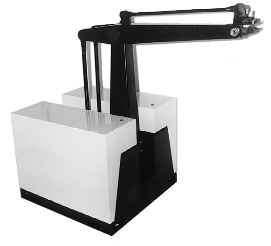 SNF-F2, der erste Verpackungsroboter der Welt